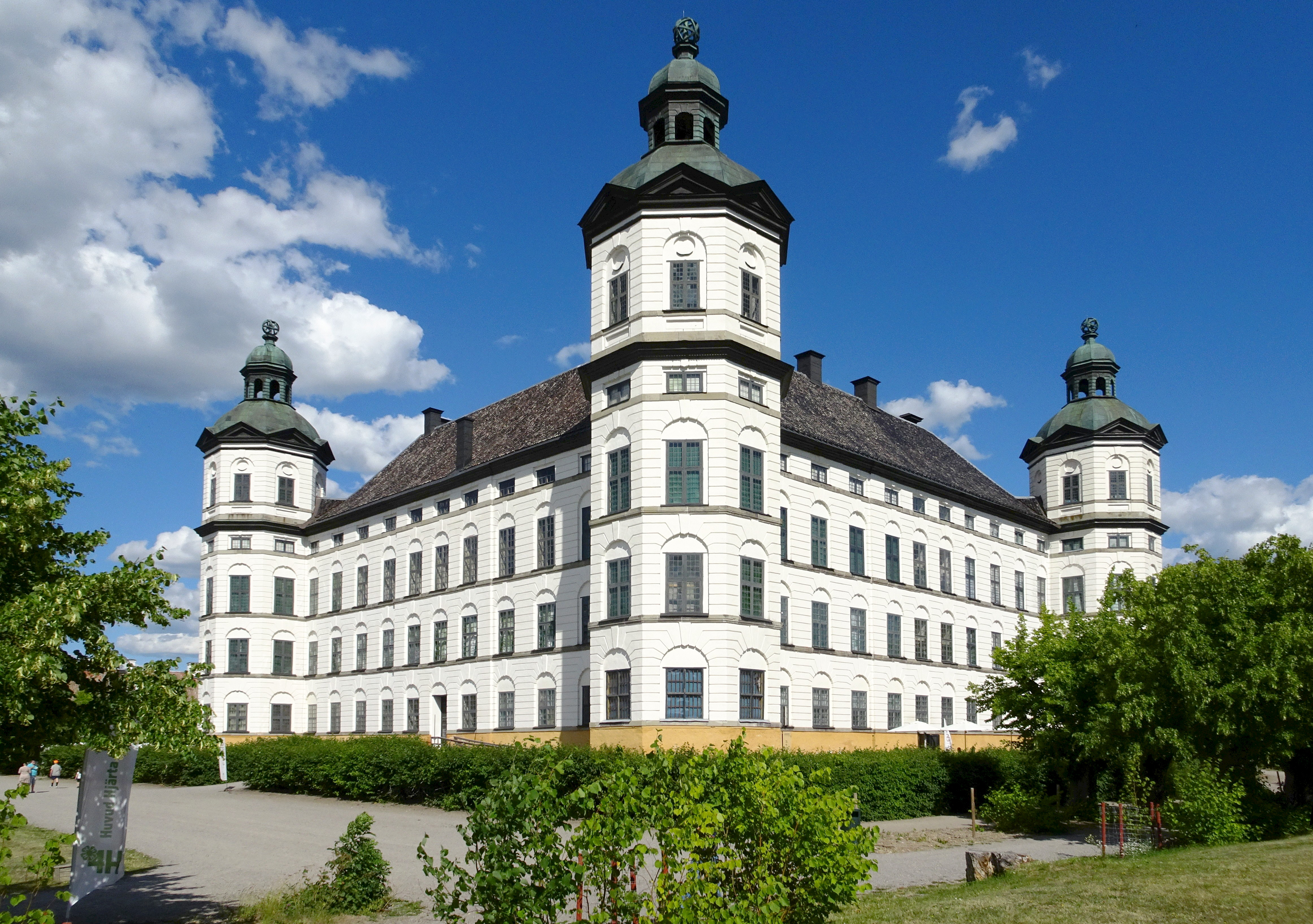 Skokloster slott, fasad mot väst, juli 2018